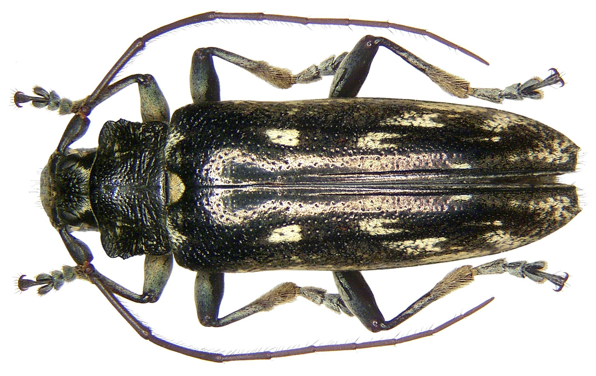 Familie: Cerambycidae Groesse: 22 mm Fundort: Indonesien, Sulawesi, Bonthain leg. Everett; det. K.M.Heller, 1897 Coll. Museum Dresden Foto: U.Schmidt, 2007